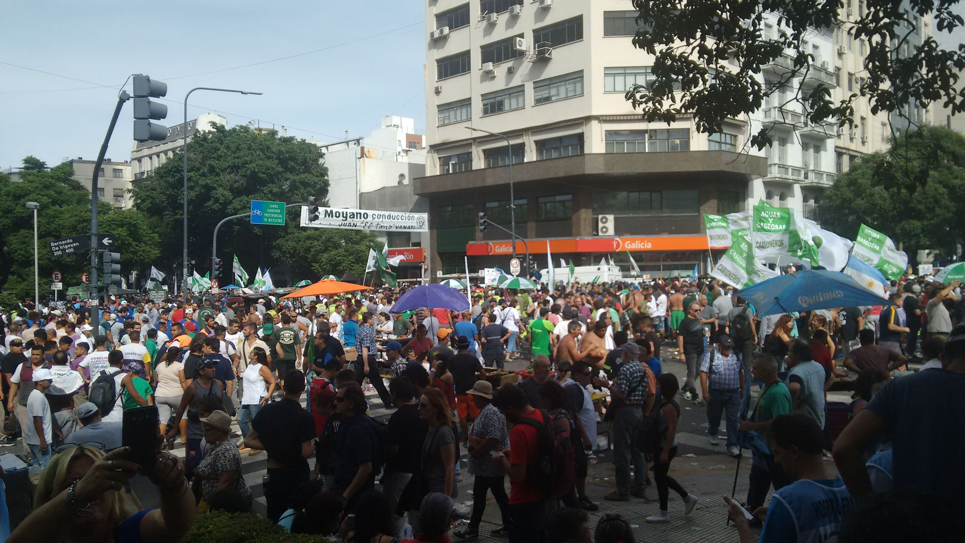 Foto de la marcha del 7 de marzo